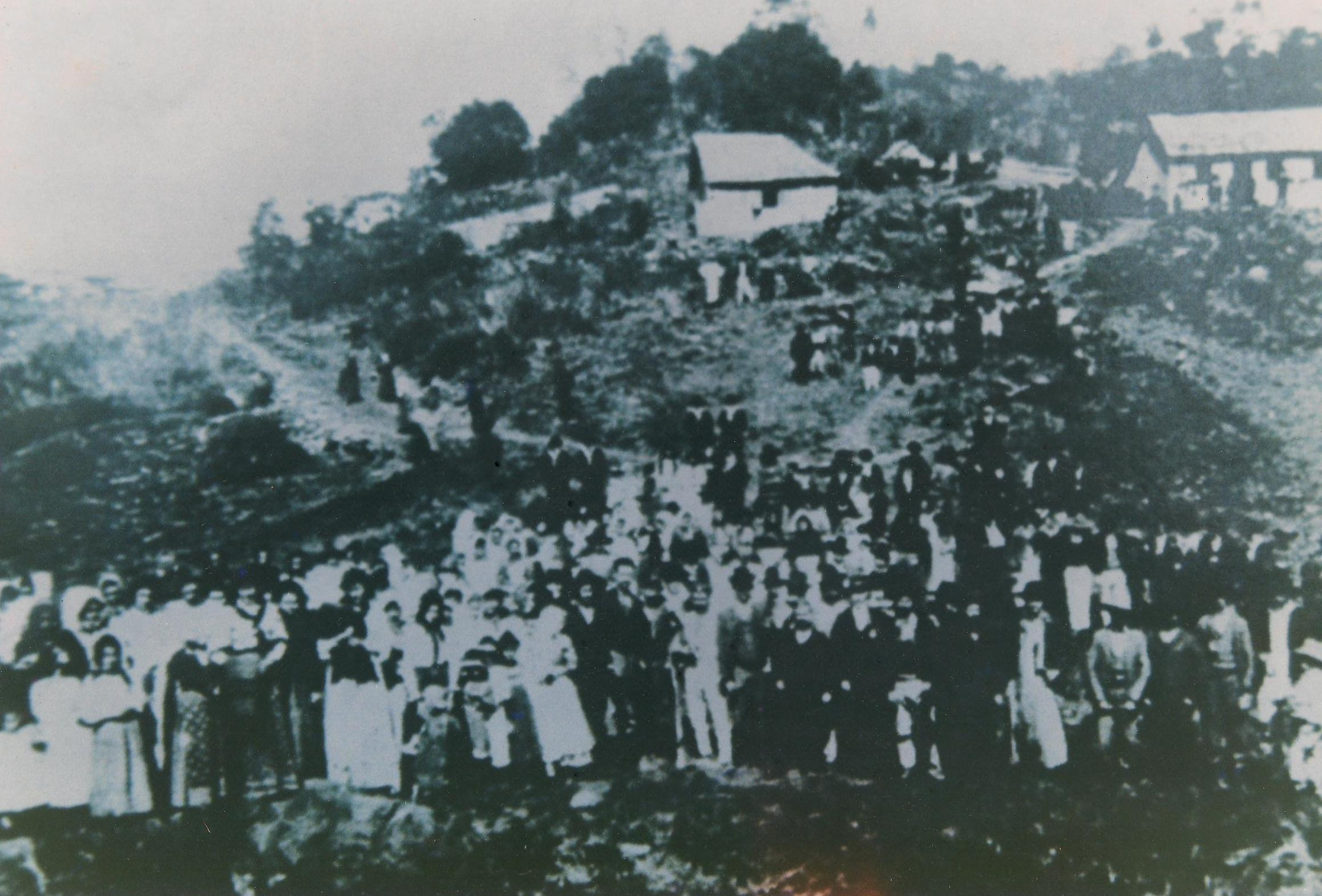 Revolta do Quebra-Quilos, Brasil, Nordeste 1874.